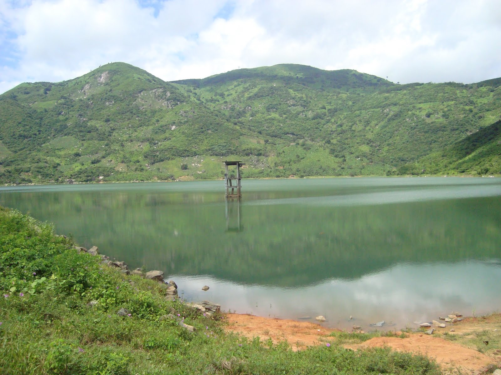 Açude Mundaú na cidade de Uruburetama no estado do Ceará